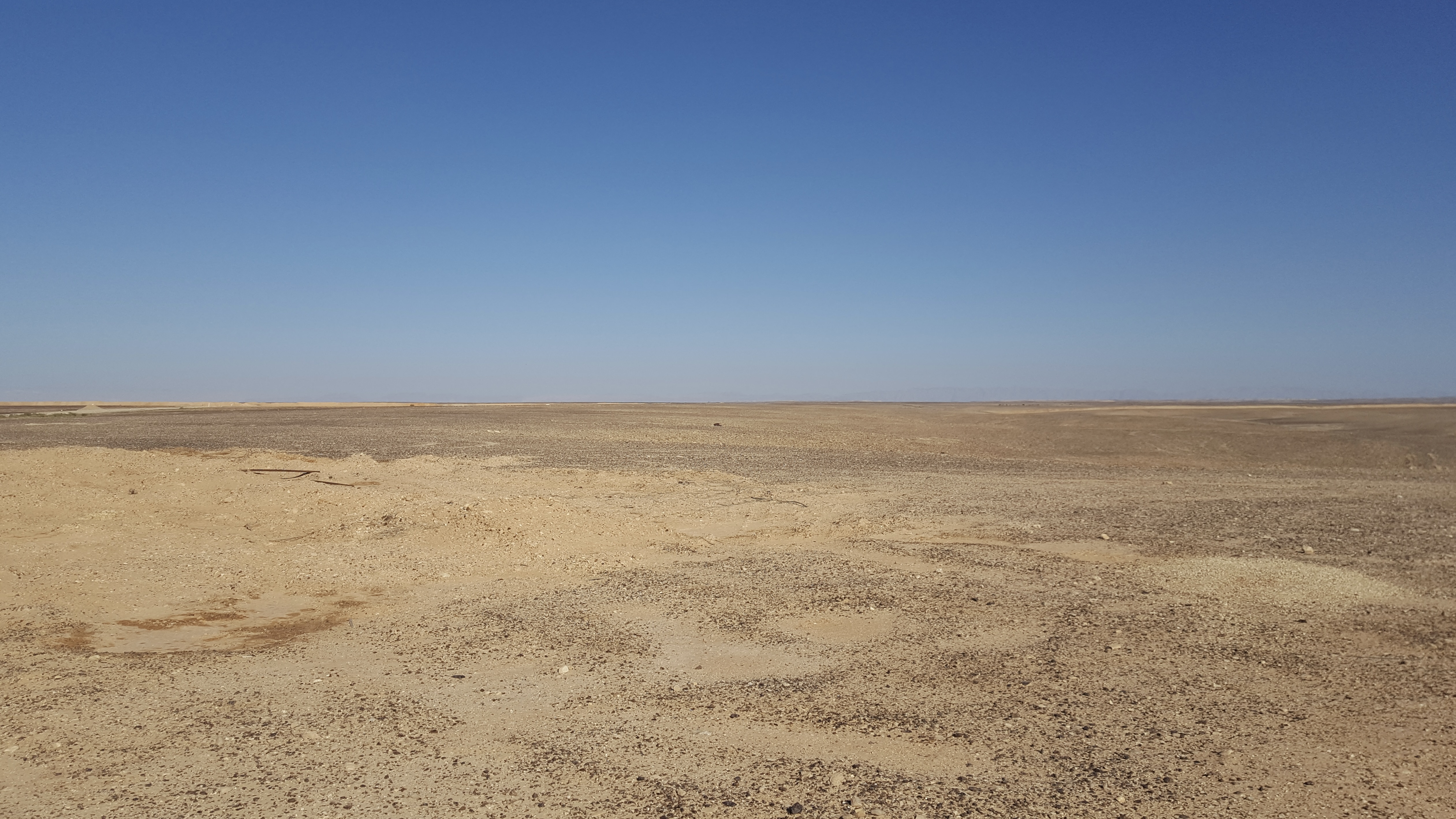 מישור פארן